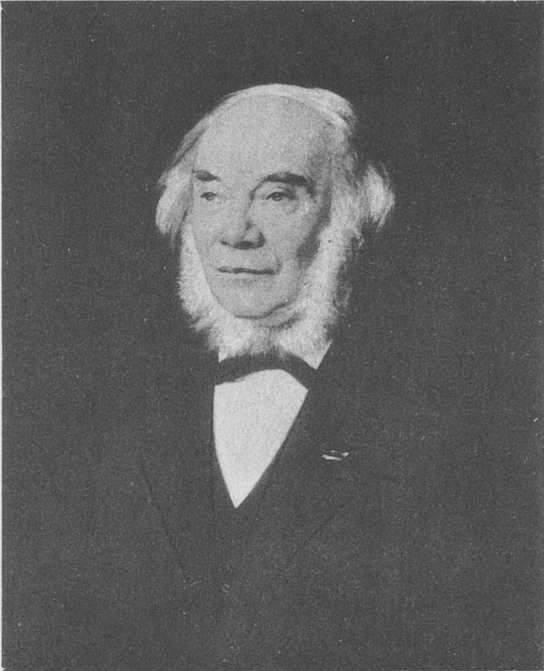 Professor Marcus Jacob Monrad